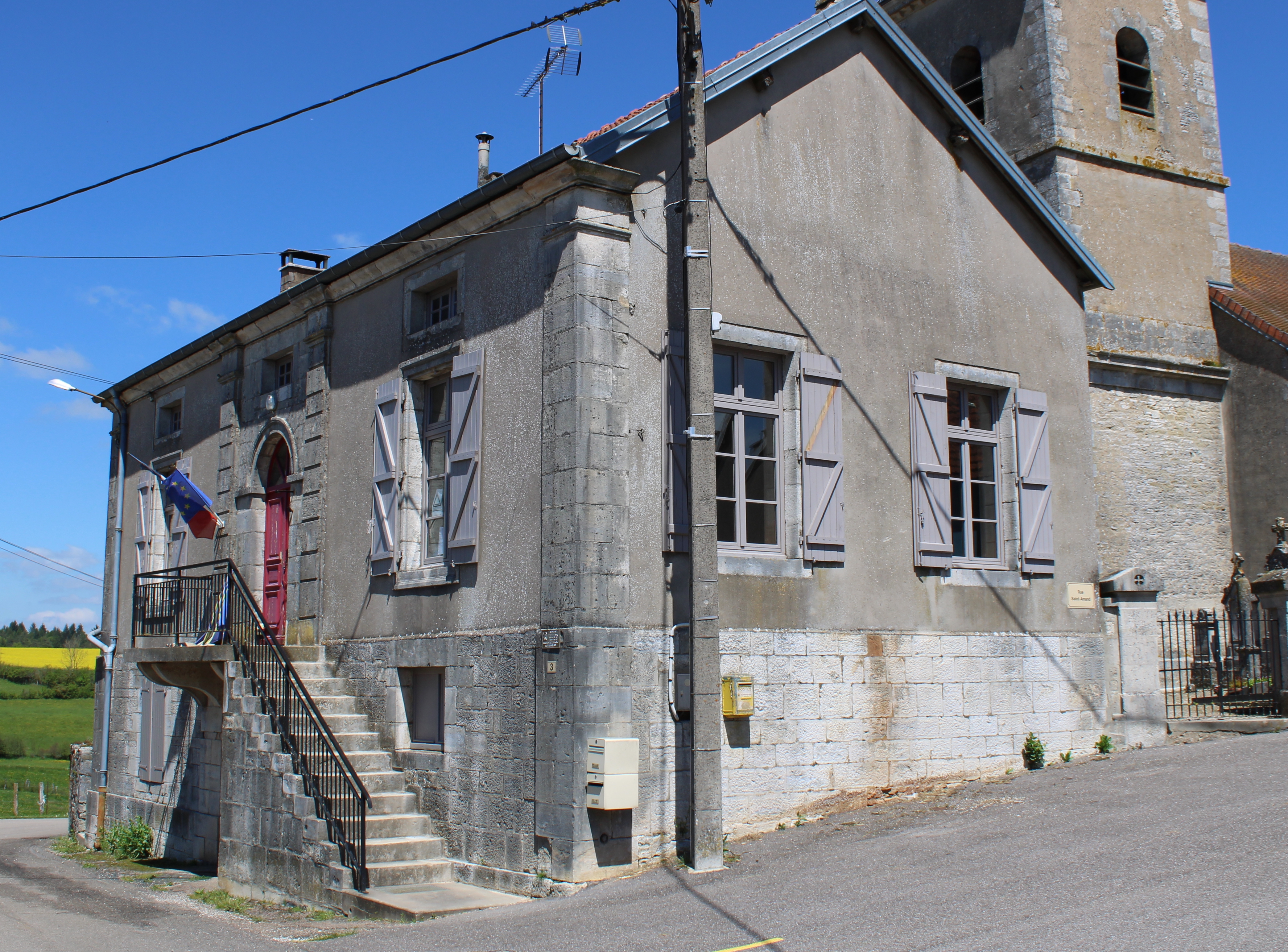 La mairie